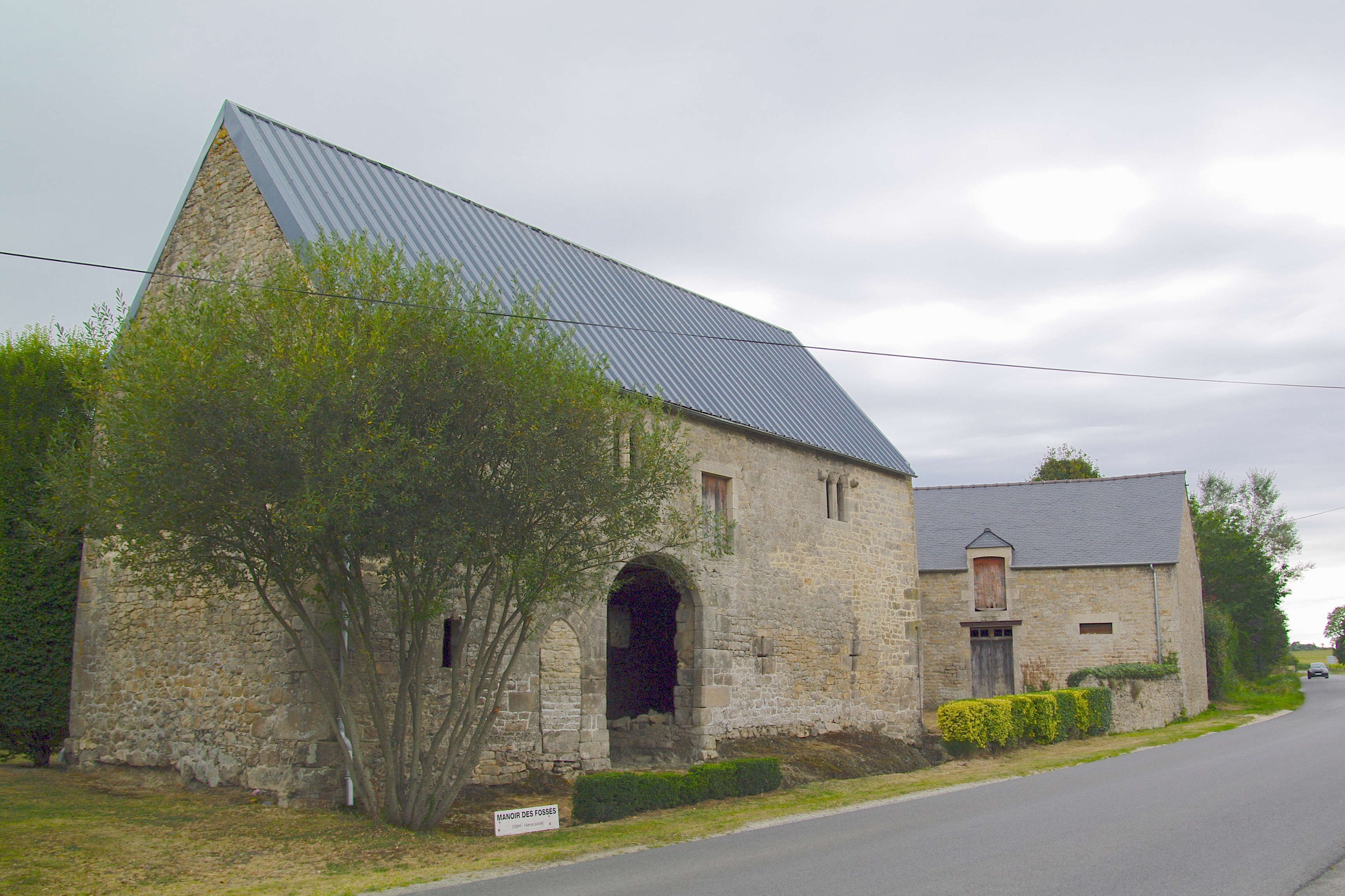 Manoir des Fossés, (Inscription, 1992) .